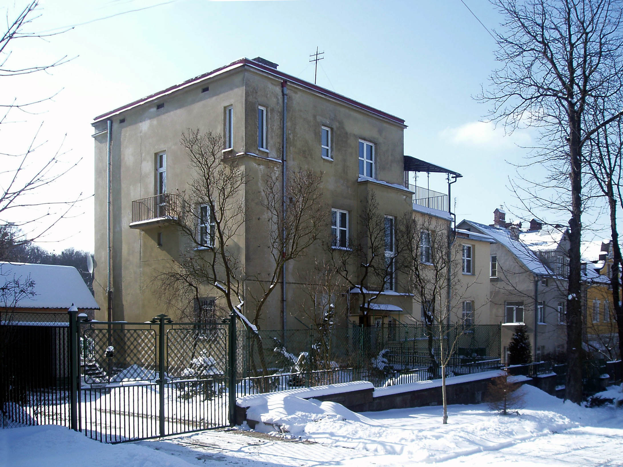 Власна вілла архітектора Владислава Дердацького (1930). Будинок № 18 на вулиці Цетнерівка у Львові.